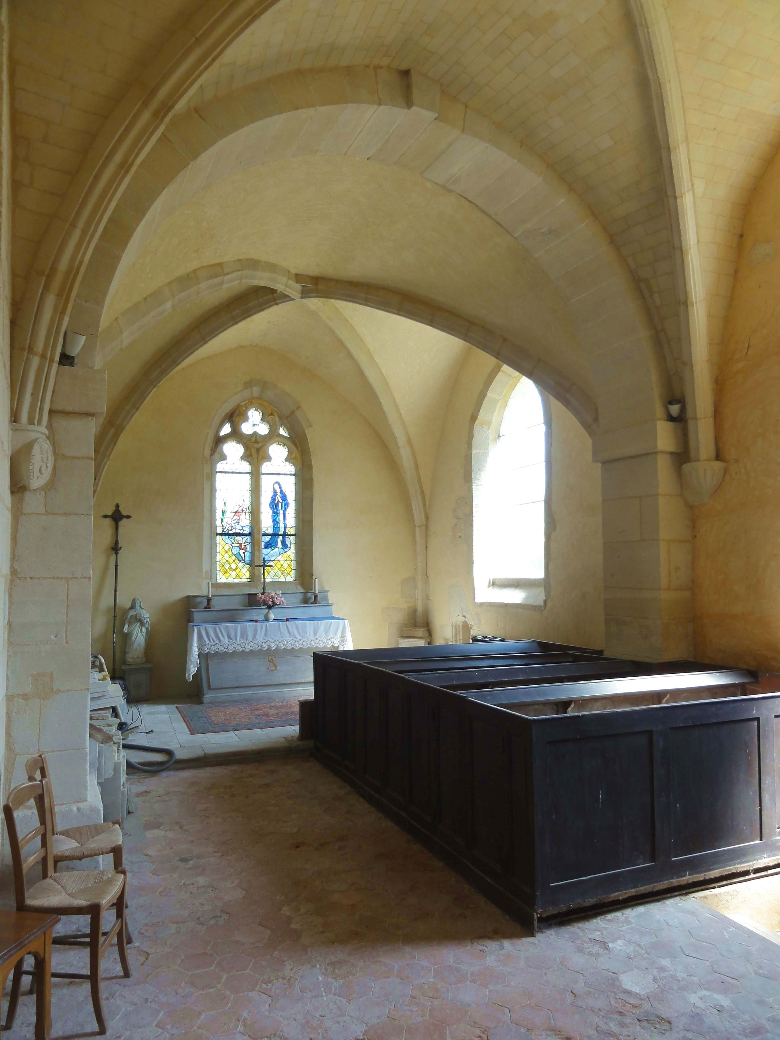 Intérieur de l'église (voir titre).